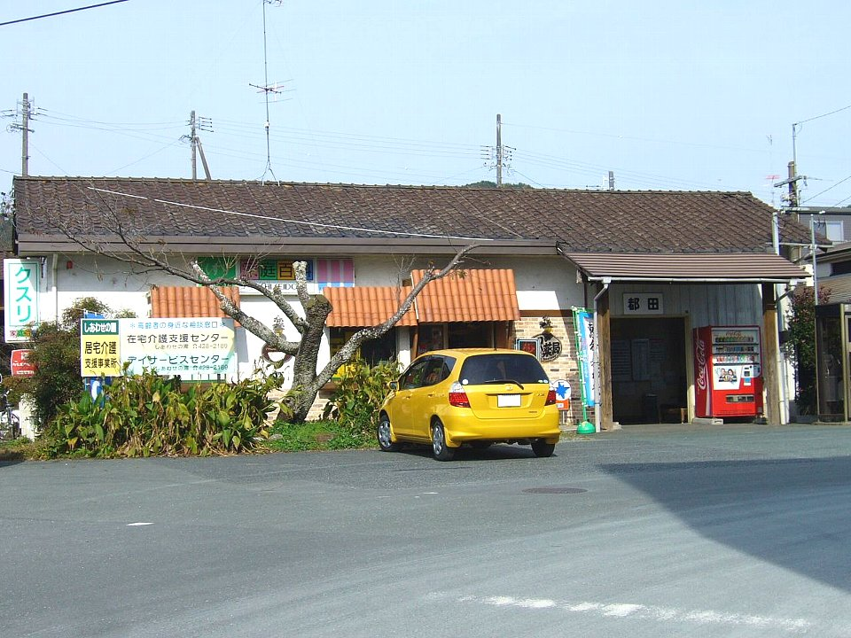 天竜浜名湖鉄道都田駅 駅舎